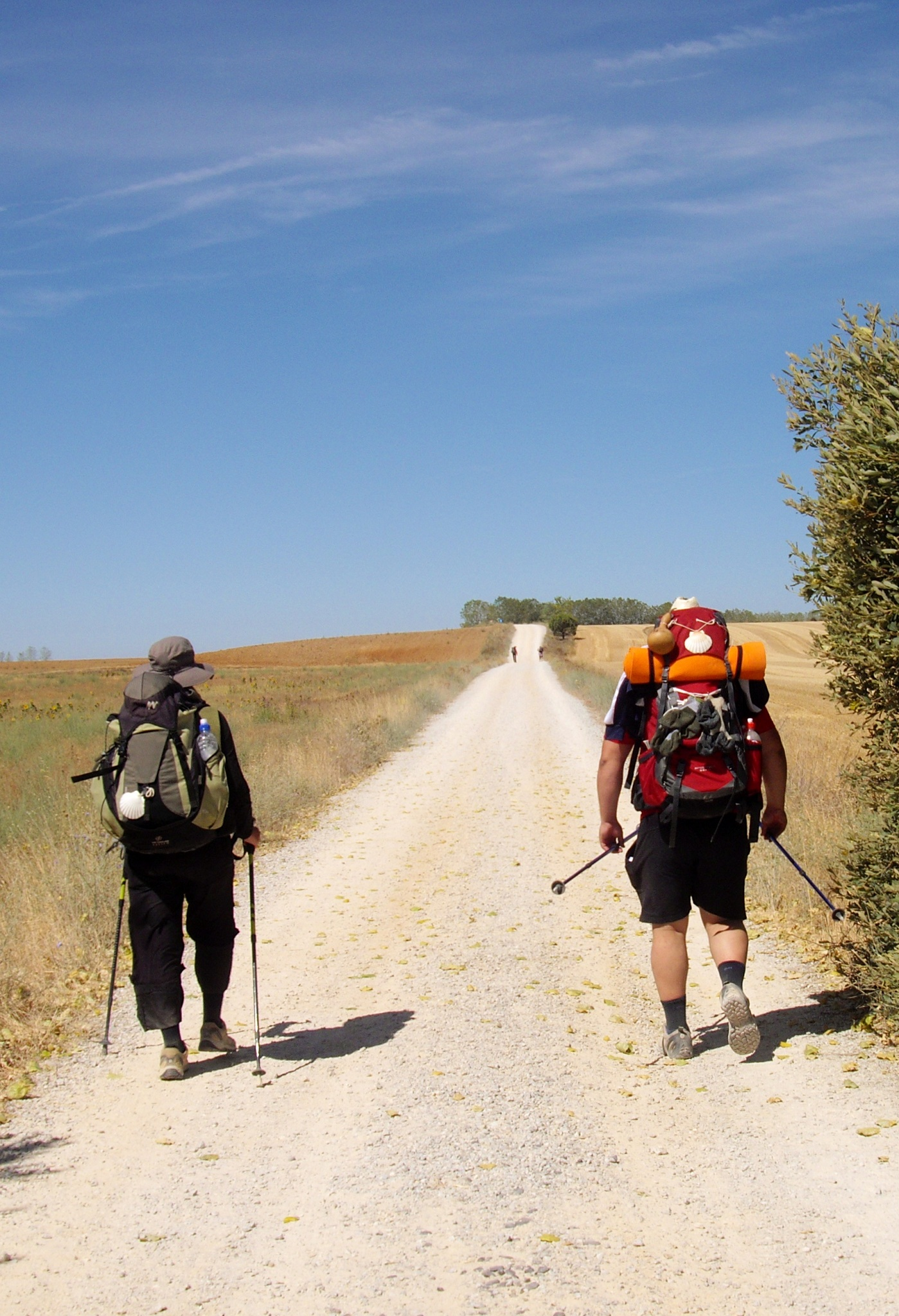 Pèlerins sur le camino de Santiago entre Carrión de los Condes et Sahagún.